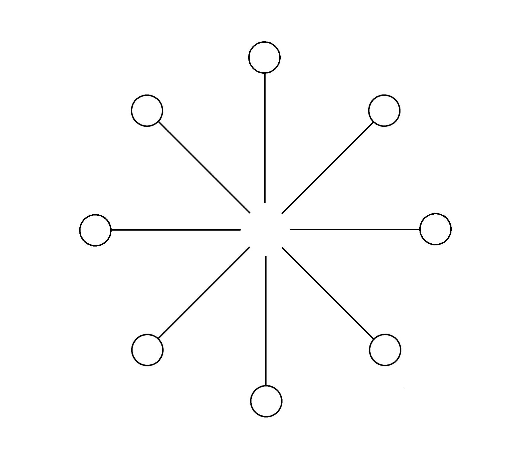 No virsmaktīvo vielu molekulām veidojušās micelles shematisks attēls.